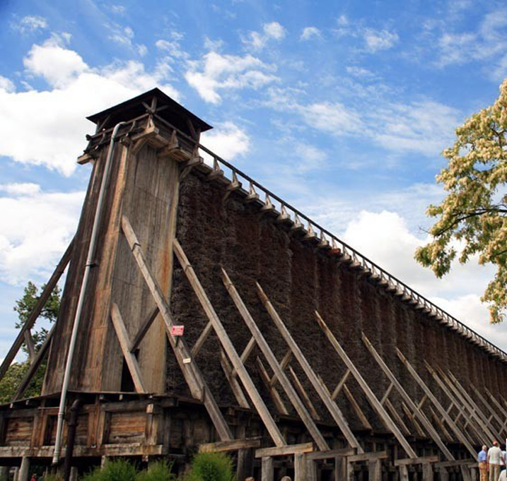 Polska